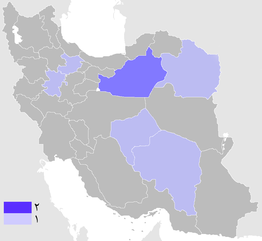 استان‌های محل تولد رئیس‌جمهورهای ایران